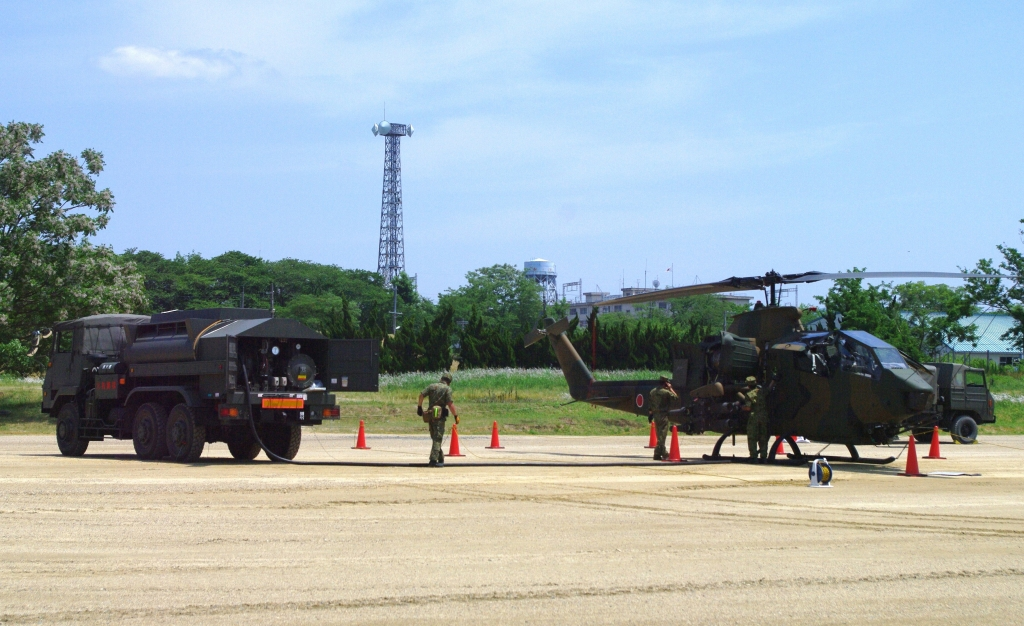 3トン半航空用燃料タンク車03